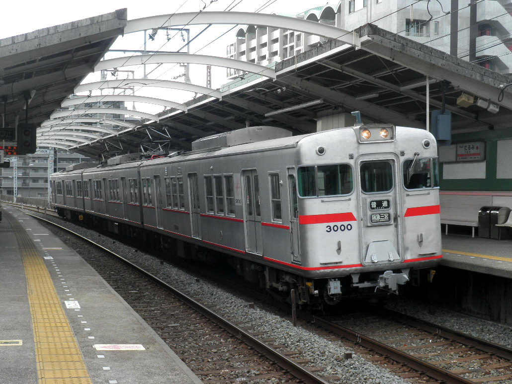 登場時の帯に復刻された3000F